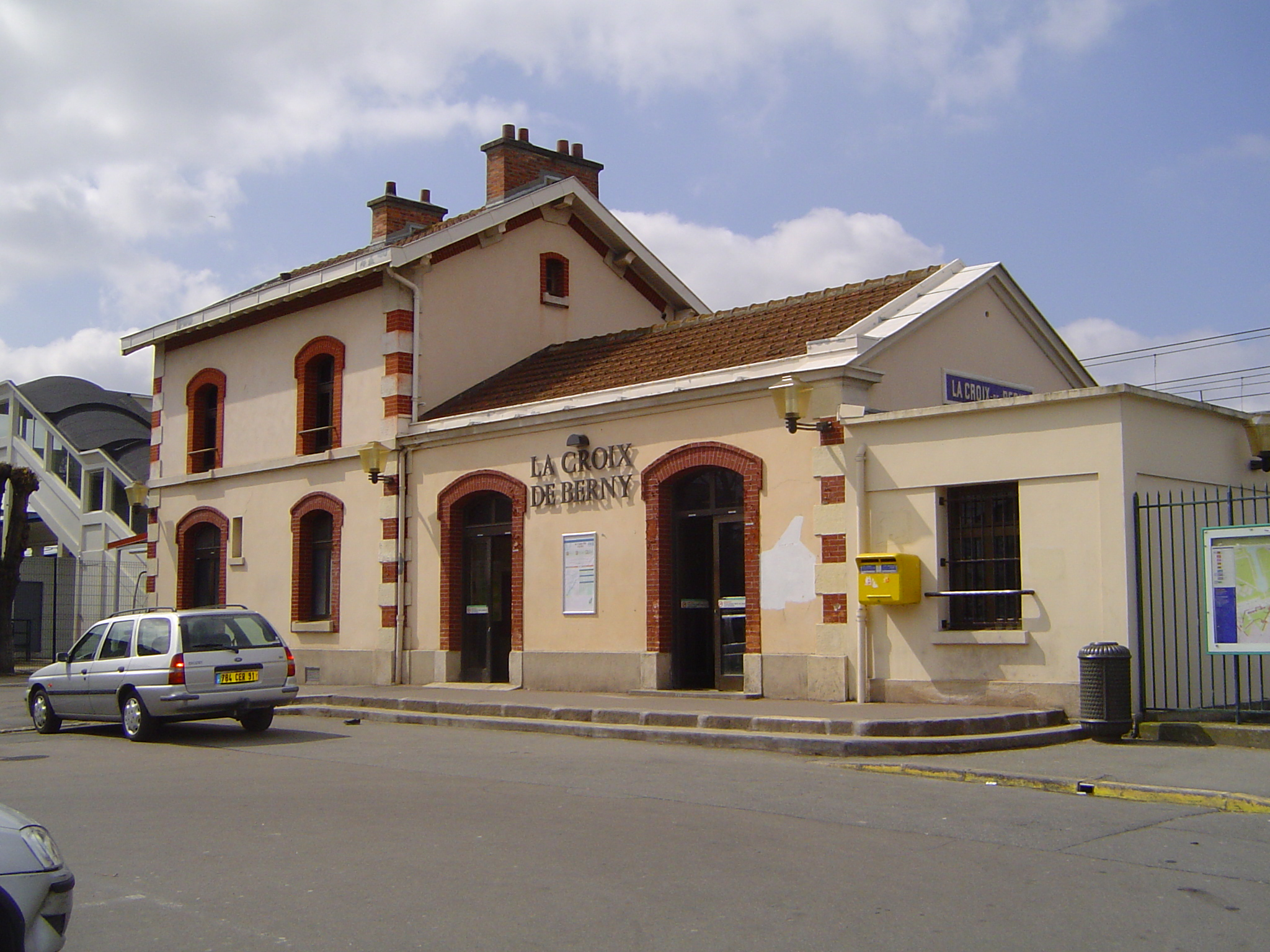 Gare de la Croix-de-Berny